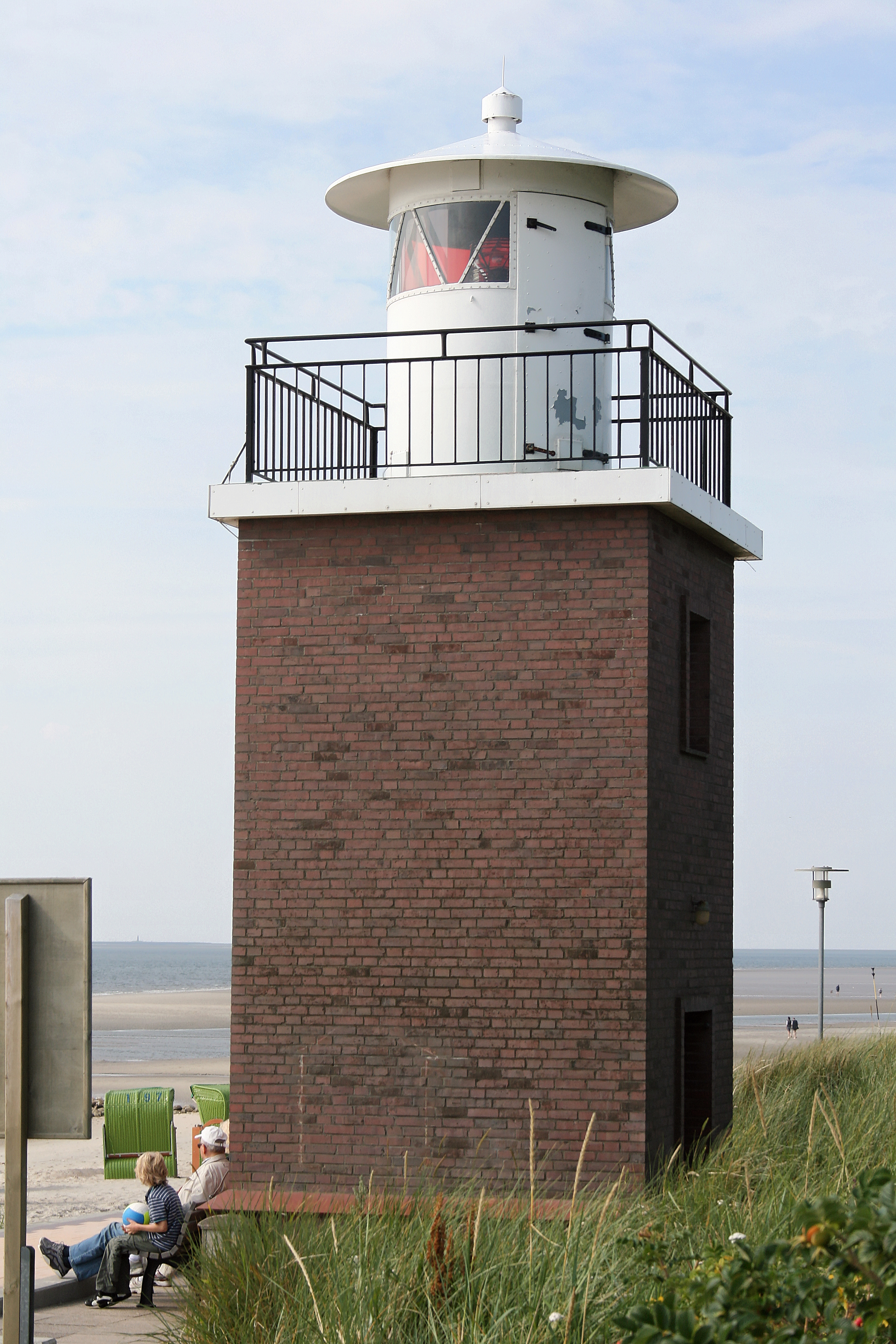 Leuchtturm in Wyk auf Föhr.